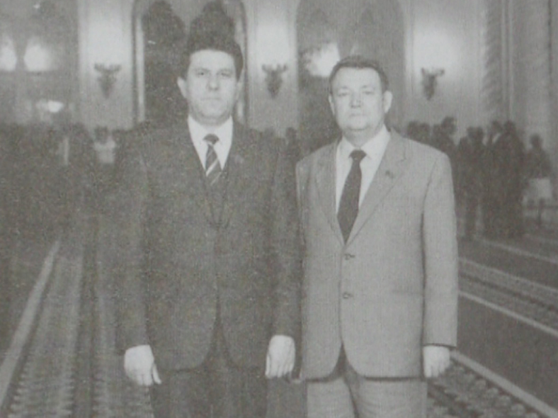 Ю.П. Кочетков и Ю.А. Мысников в 1983 году